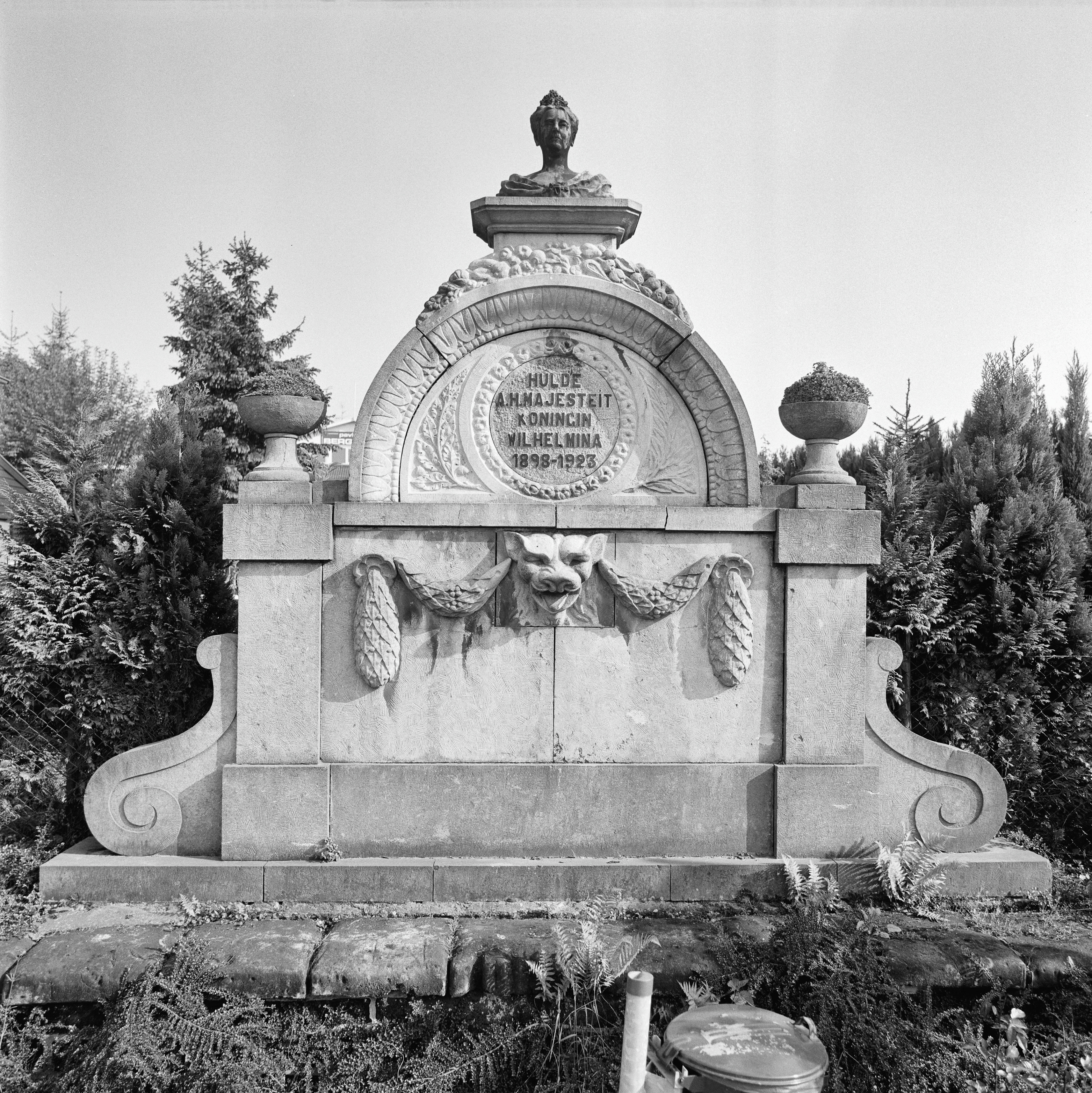 Monument Koningin Wilhelmina: Exterieur OVERZICHT